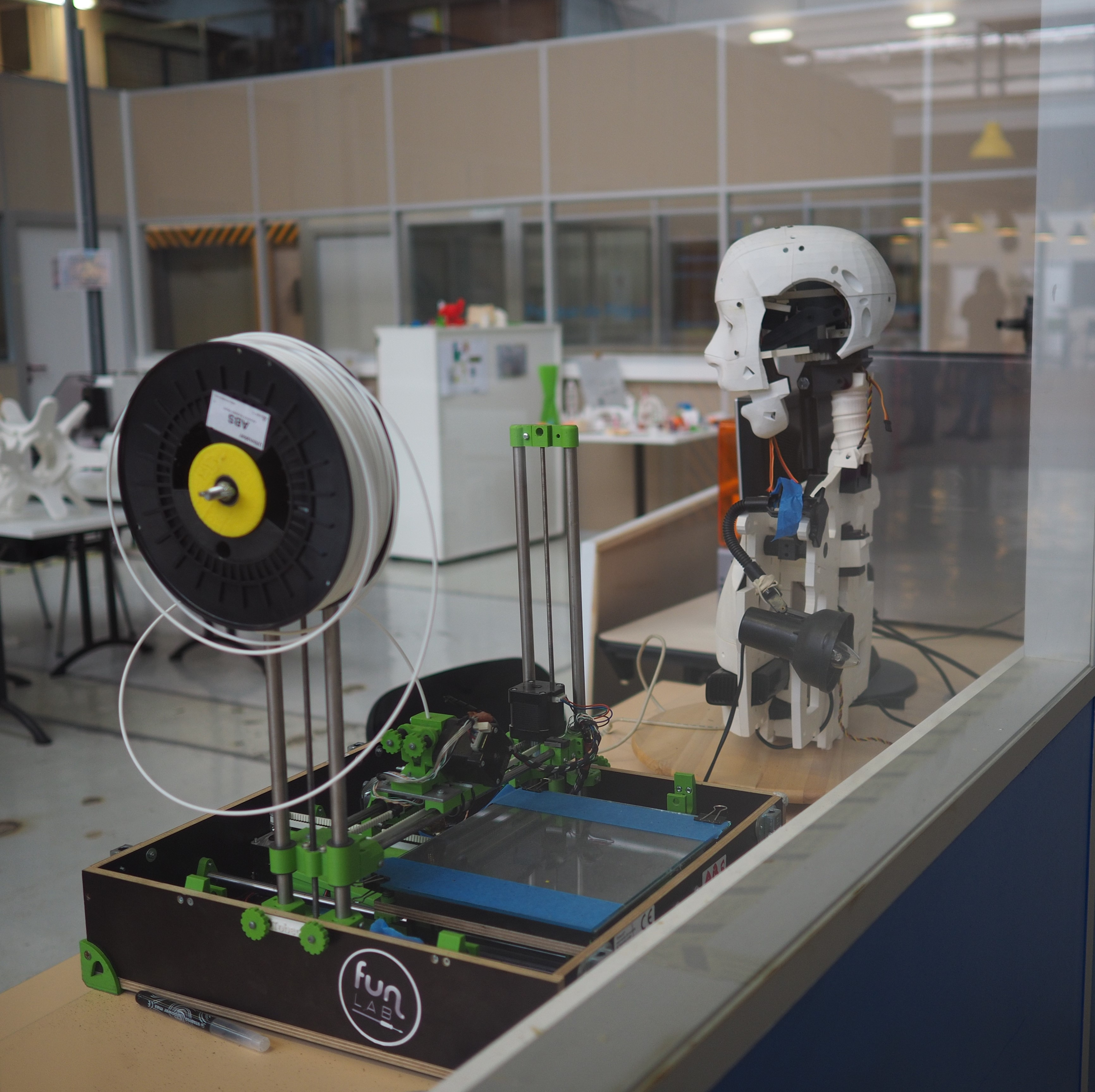 Vue sur l'imprimante 3D du Funlab.